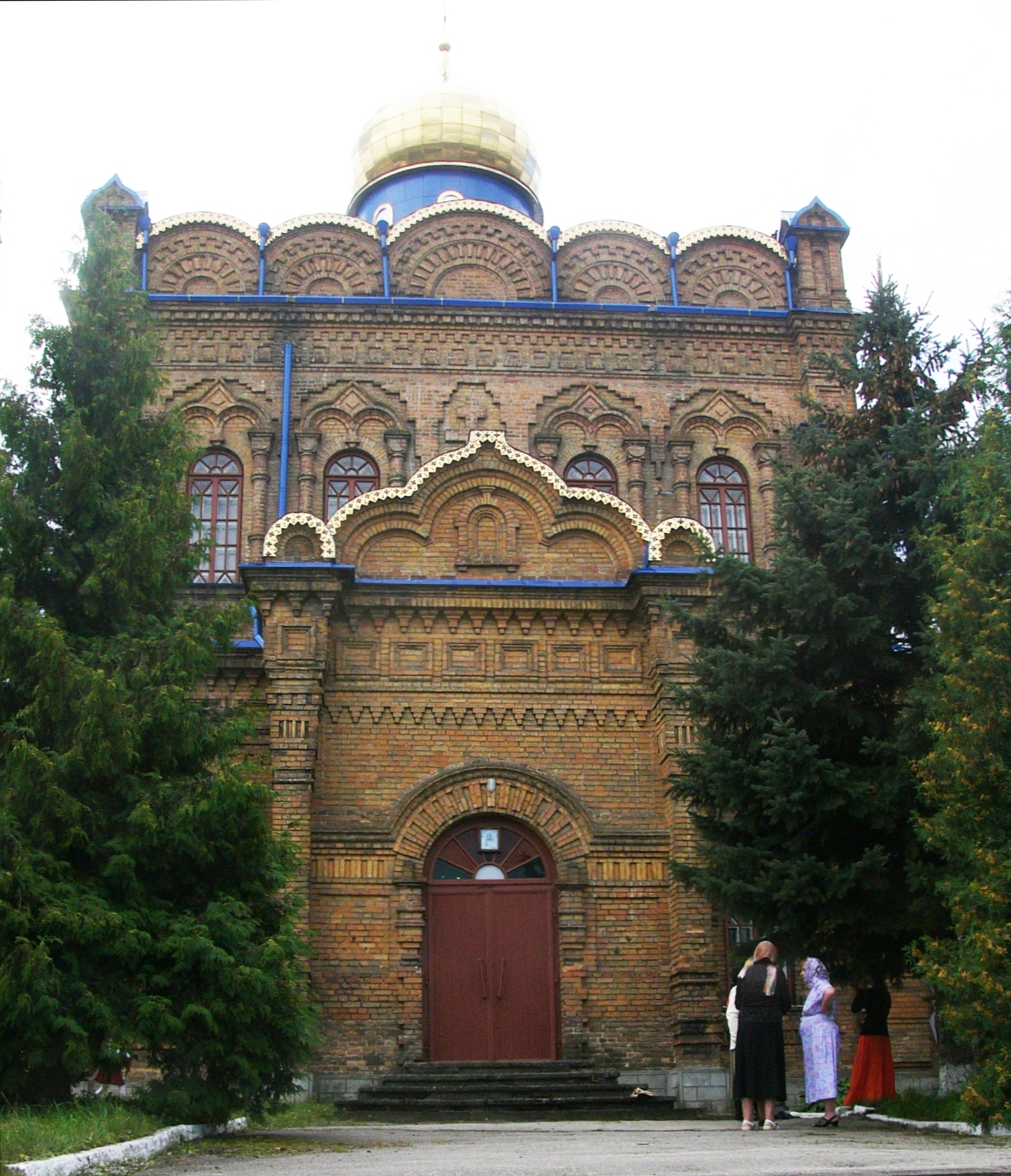 Полковая церковь 42-го Якутского пехотного полка